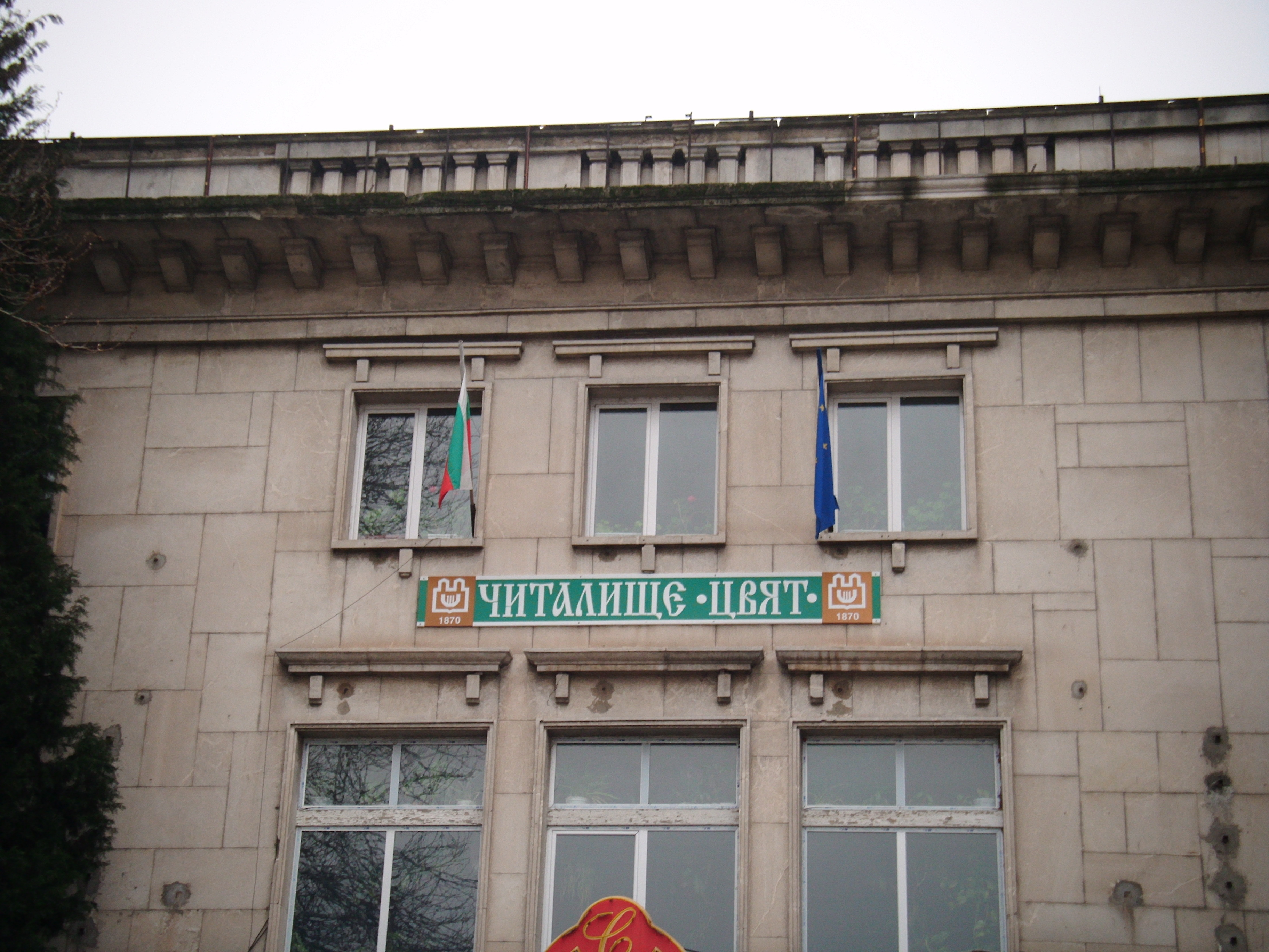 кино "Цвят"